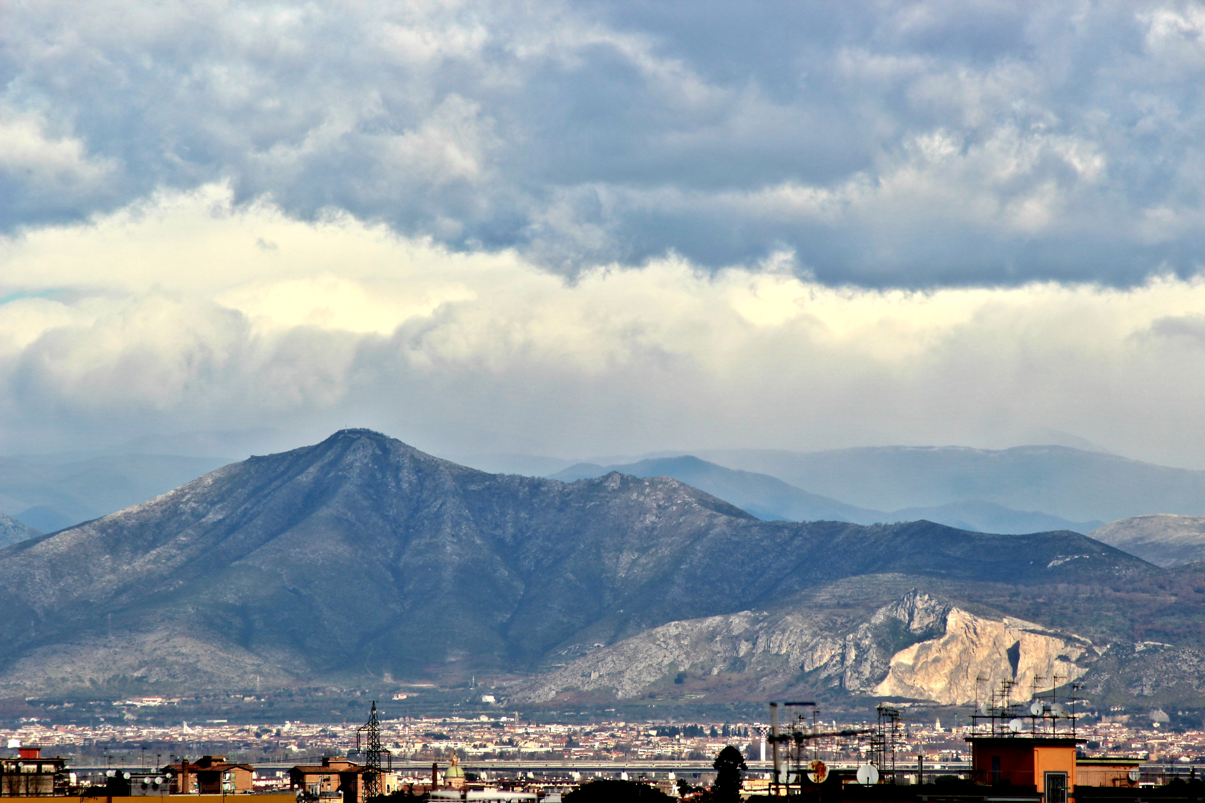 Monti Tifatini